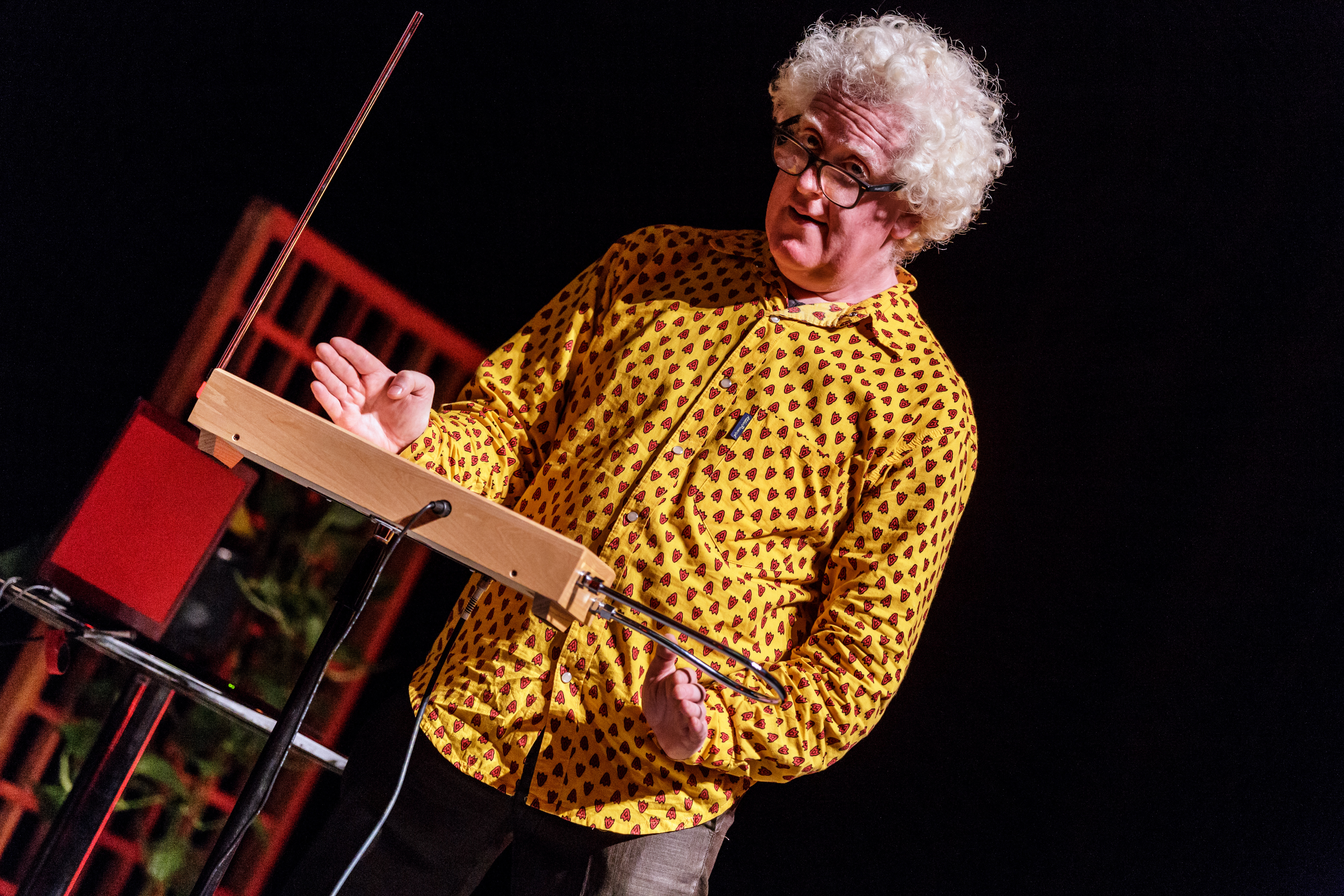 Claude-Samuel Lévine, joueur de thérémine lors du Festival européen du film court de Brest au Quartz le mardi 8 novembre 2016.